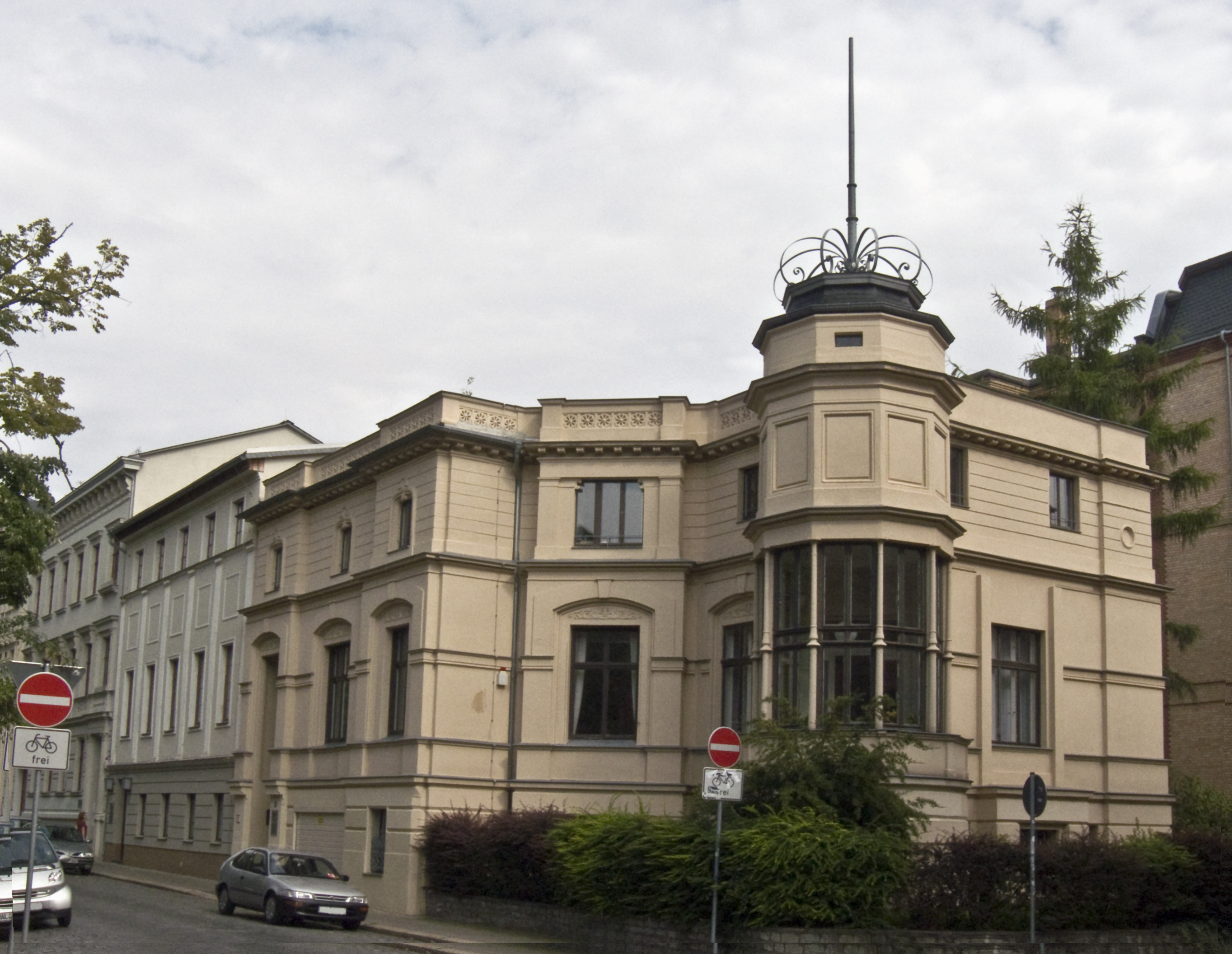 Ehemaliger Hauptsitz der Leopoldina in Halle/Saale, Emil-Abderhalden-Straße 37, aus Sicht der August-Bebel-Straße